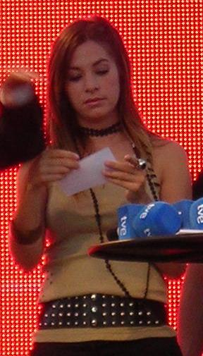 Leire Martínez, cantante de la Oreja de Van Gogh, en el set de RTVE de la villa "Club Selección", horas antes del partido de fútbol España-Bosnia, de clasificación para el Mundial 2010.